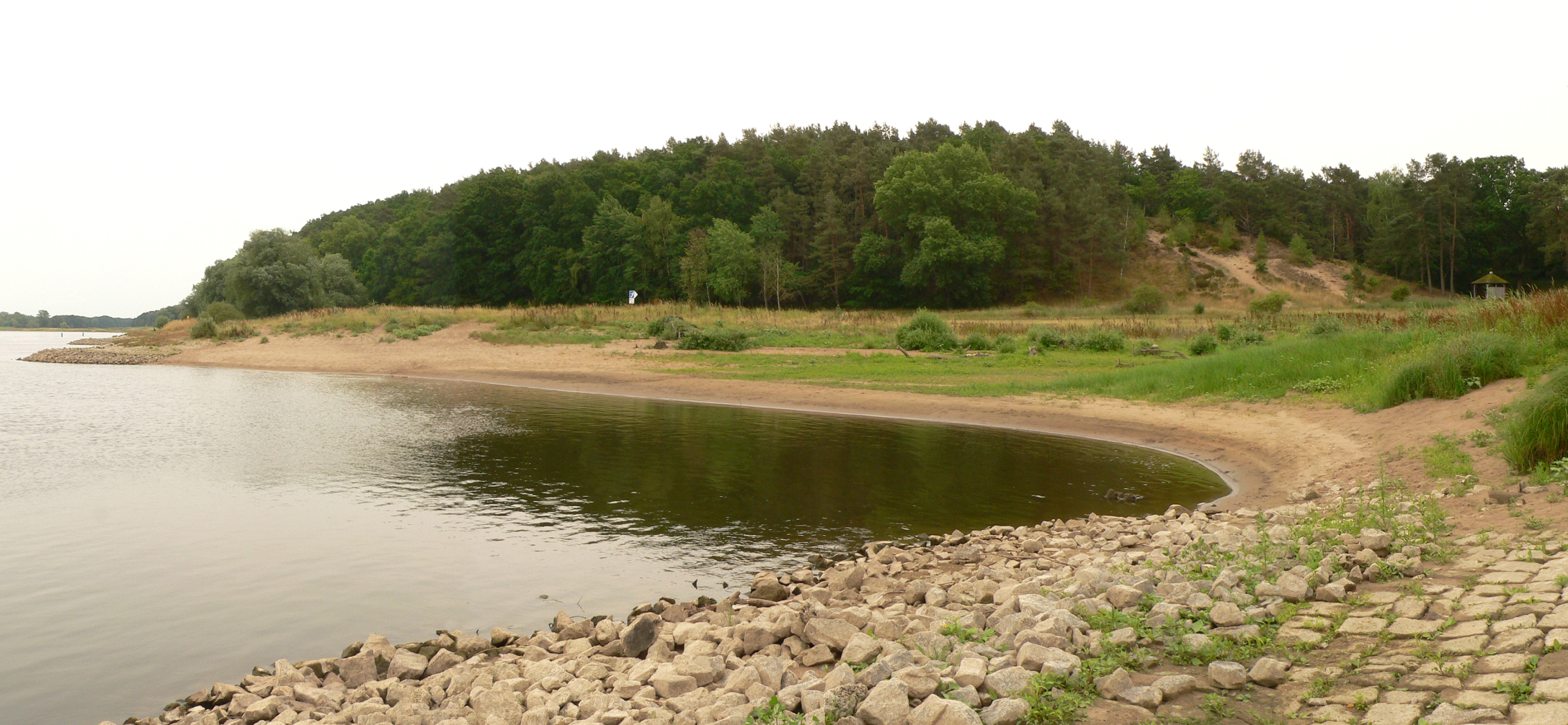 Höhbeck bei Vietze von der Elbe gesehen